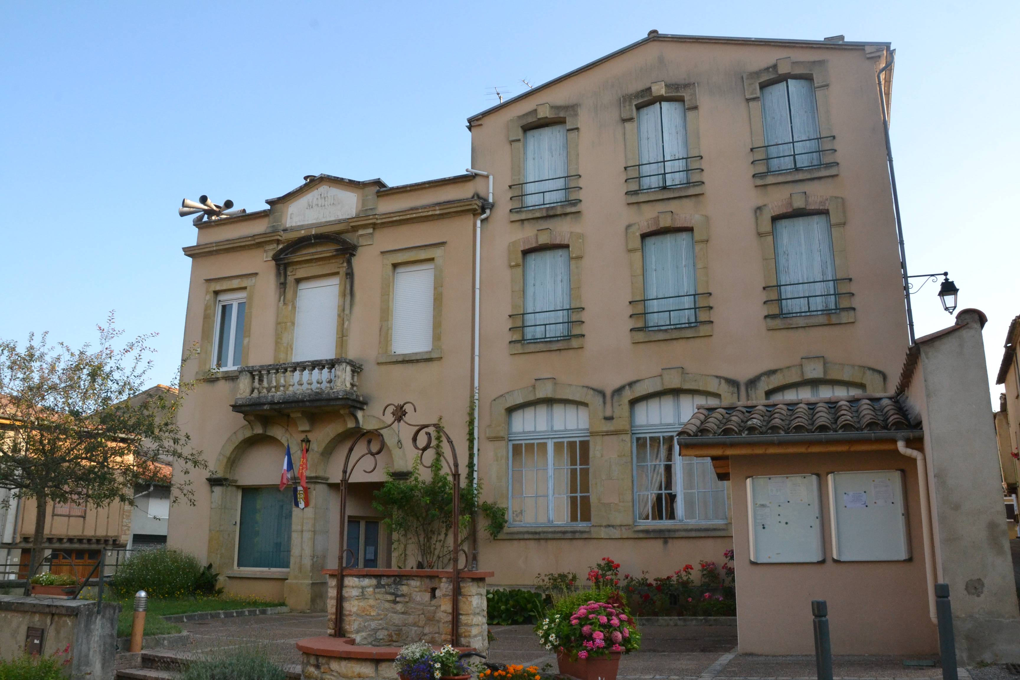 Mairie de Rivel (Aude, France).